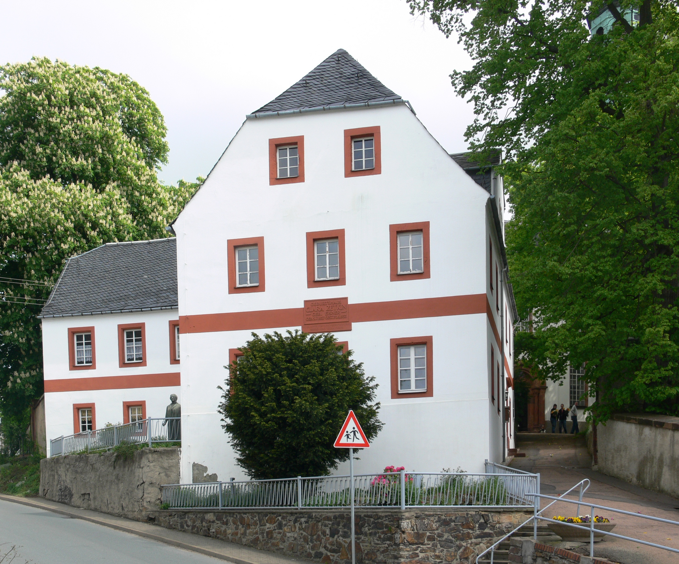 Königshain-Wiederau, Ortsteil Wiederau, Geburtshaus von Clara Zetkin, geb. Eisner